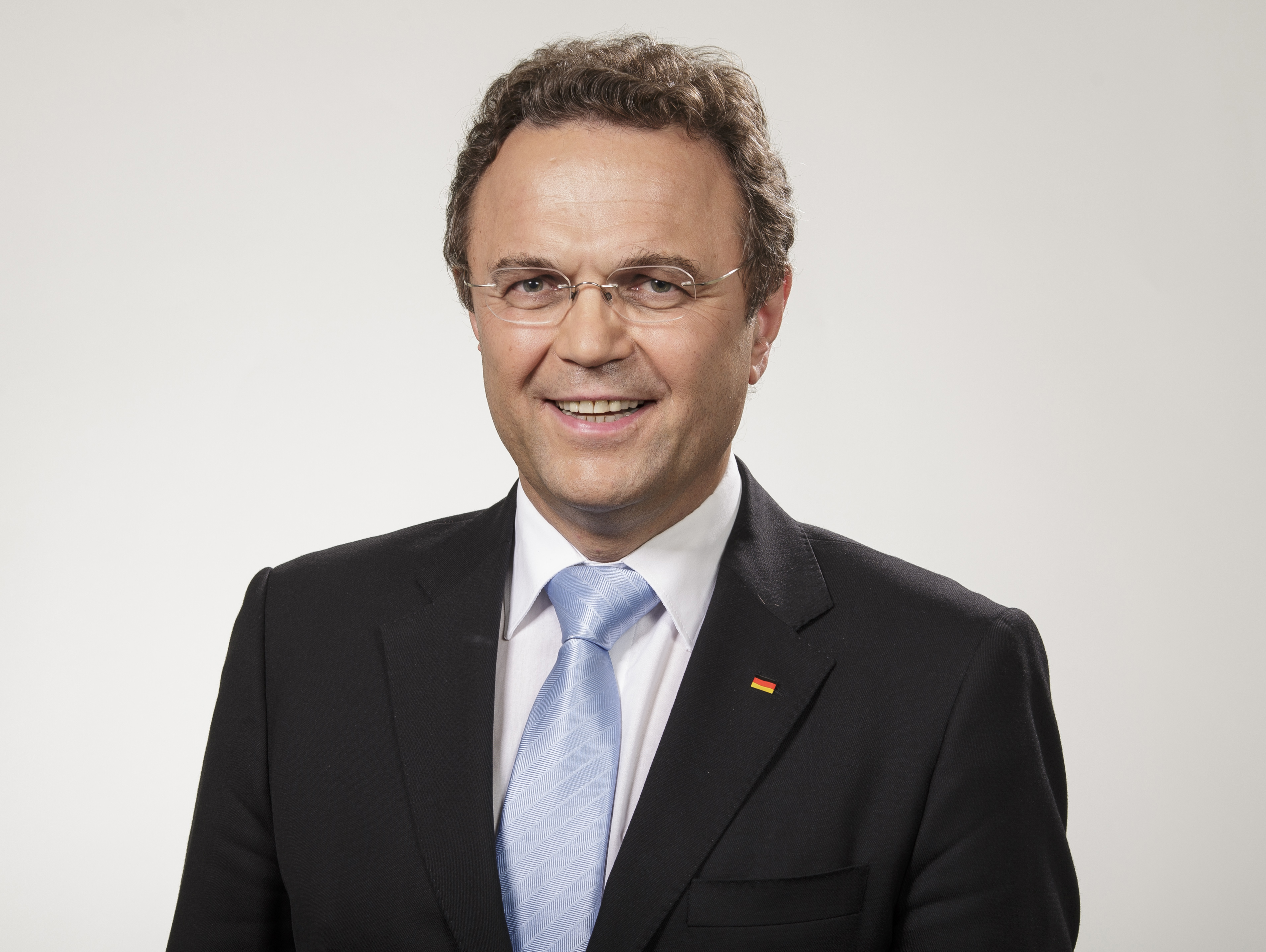 Hans-Peter Friedrich, MdB (2012)